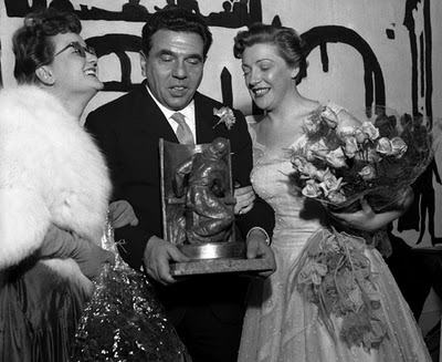 Carla Boni, Flo Sandon's e Giovanni D'Anzi al Festival di Sanremo 1953